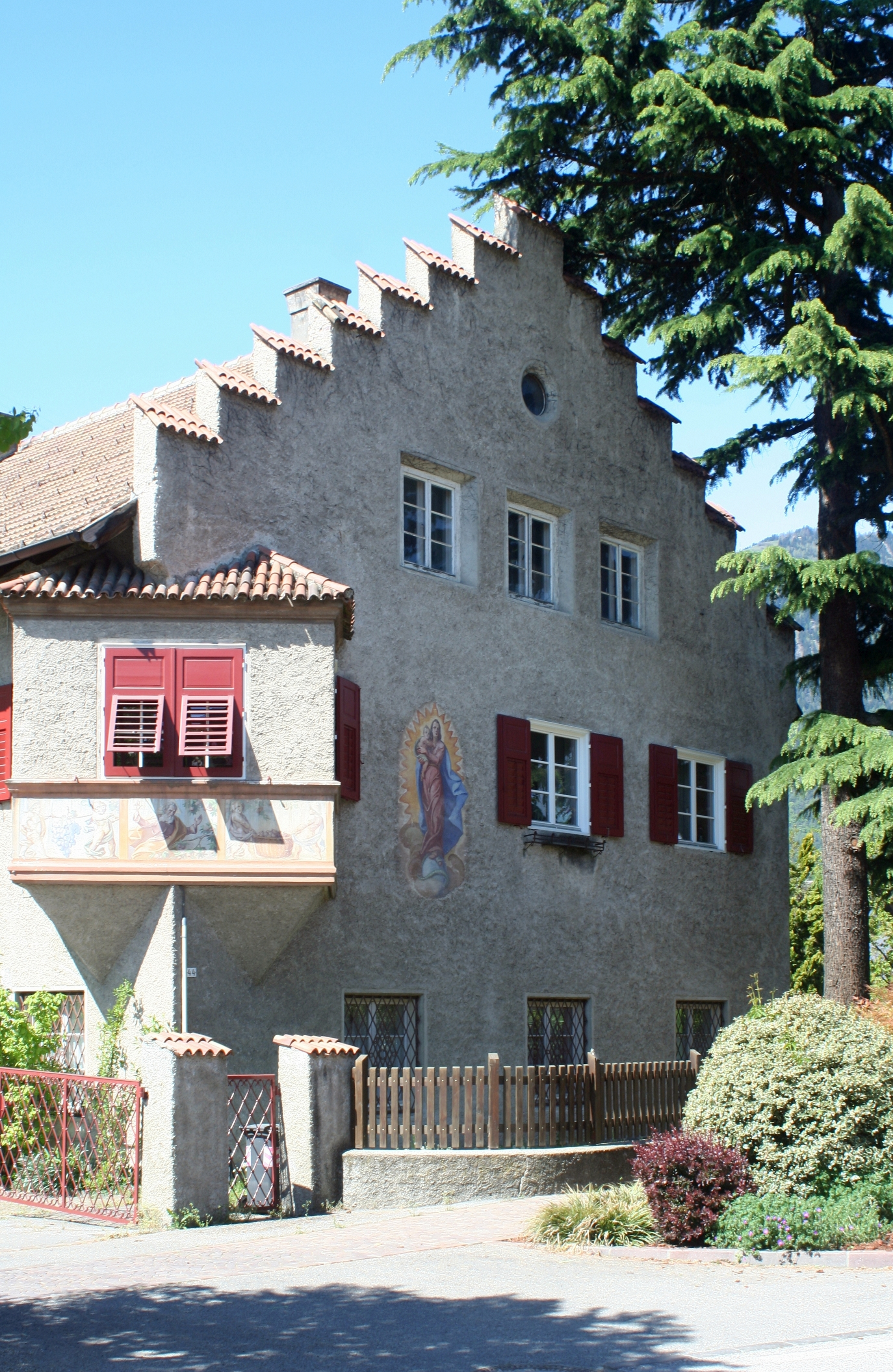 Oberbildgut in Lana